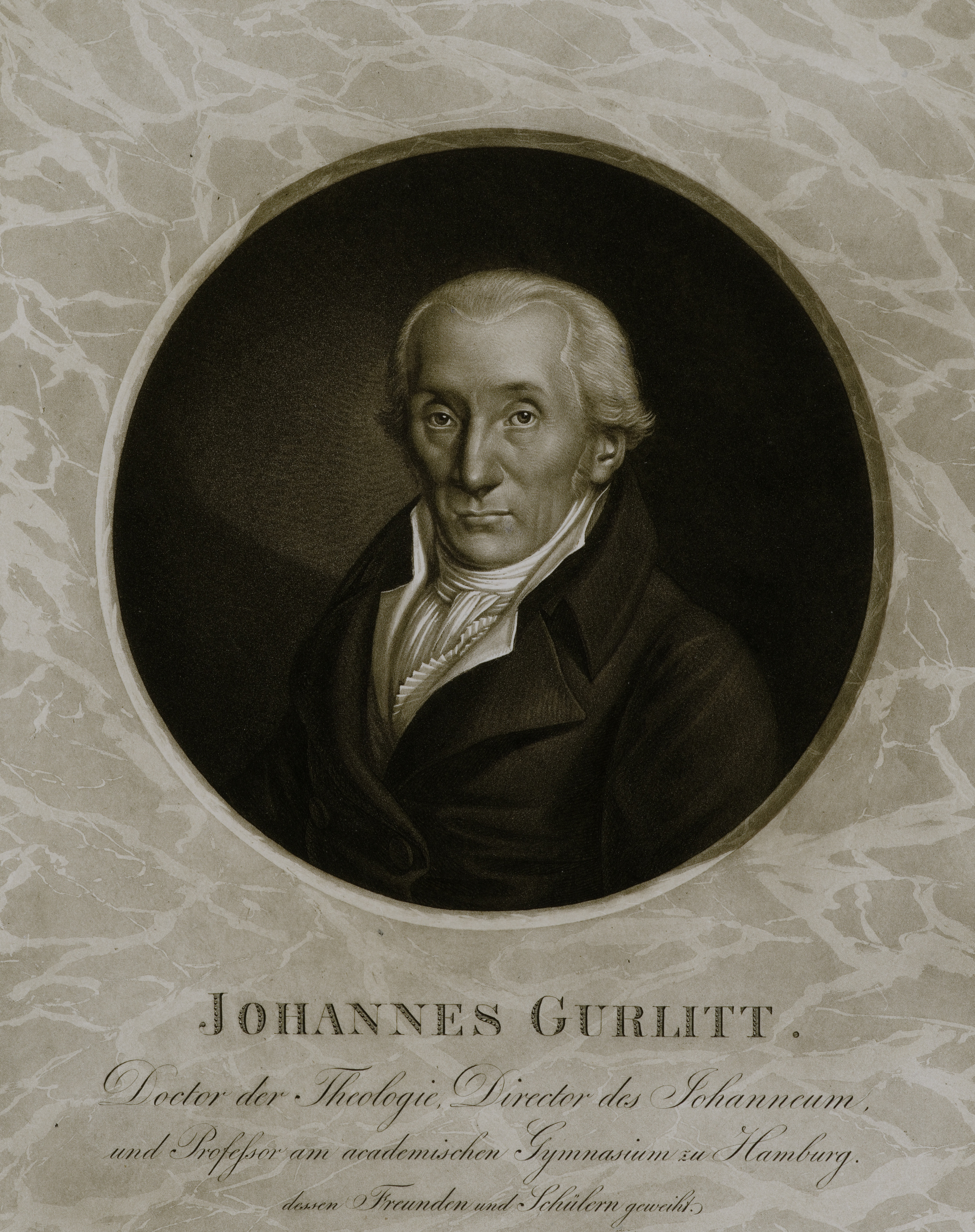 Johannes Gurlitt